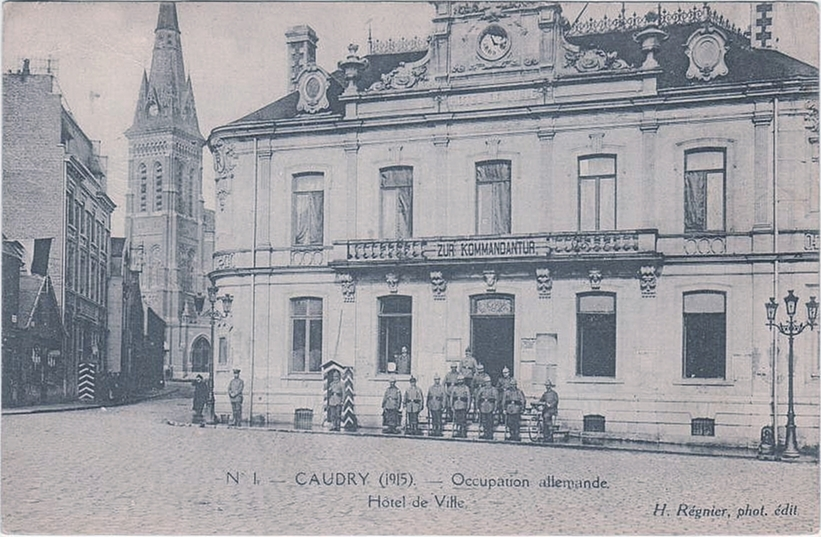 Carte postale datée de 1915 montrant l'hôtel de ville de Caudry transformé en Kommandantur.